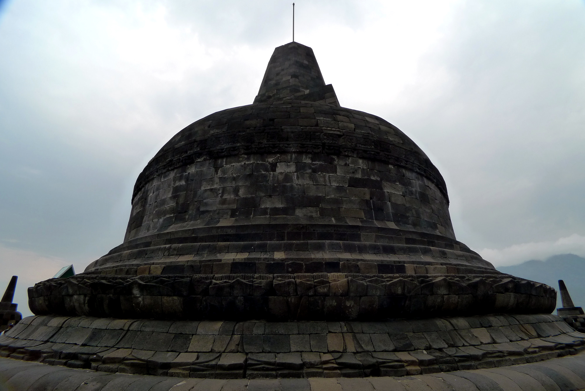 婆罗浮屠塔顶